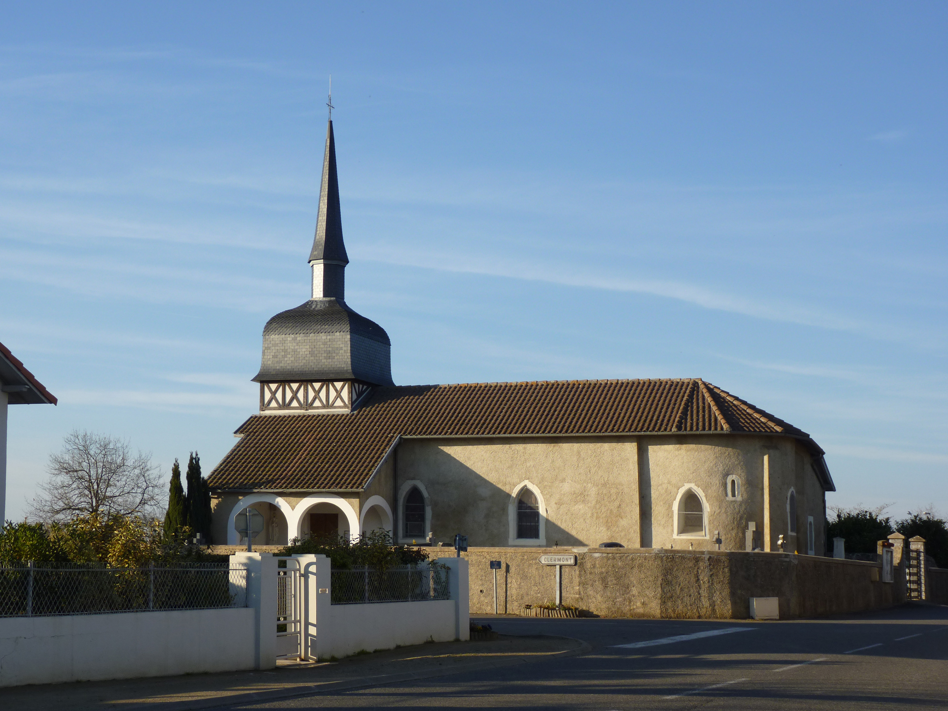 L'église d'Ozourt (Landes)